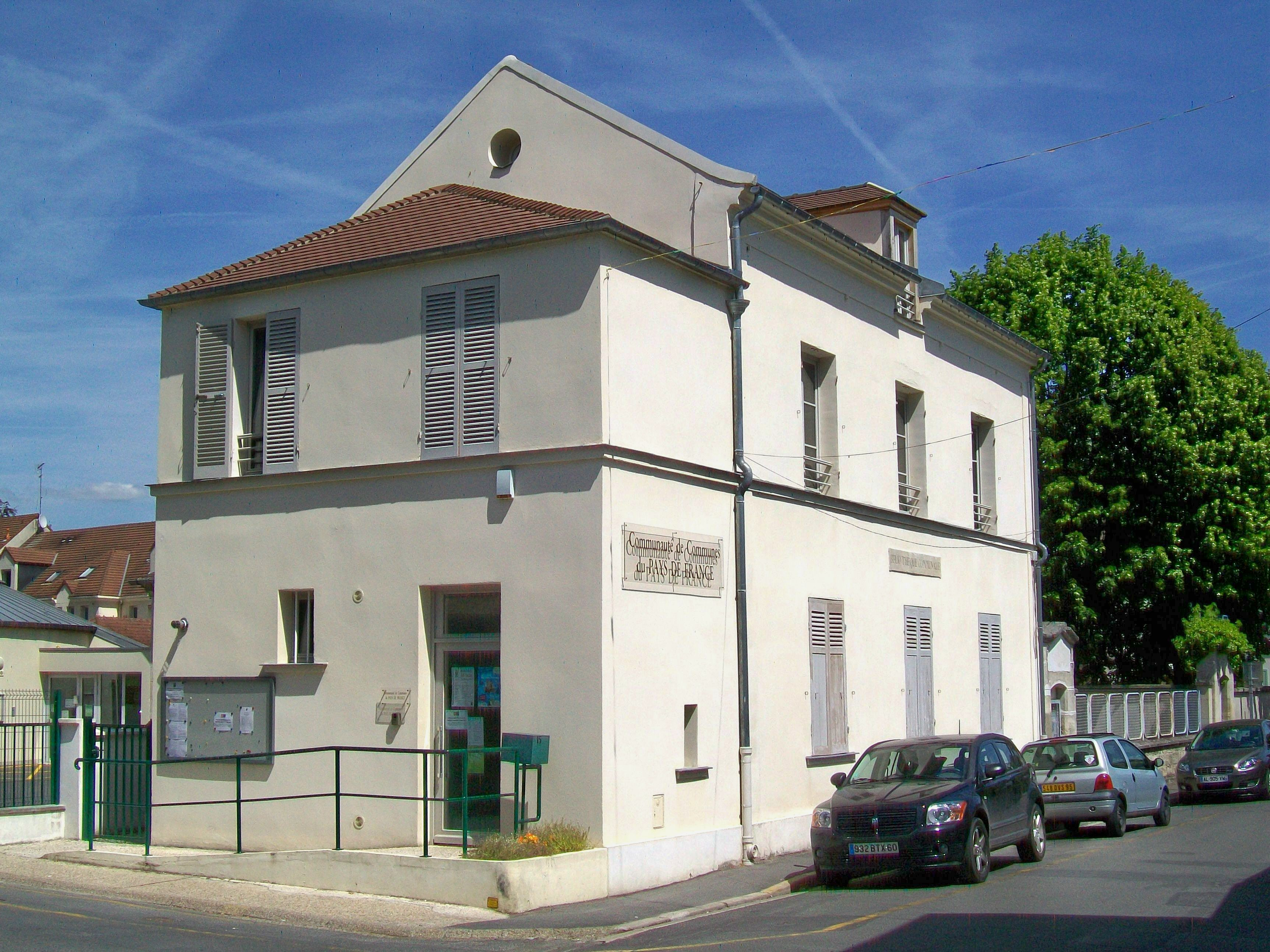 L'ancienne école des garçons de 1839, rue Bonnet. C'est le premier bâtiment à Luzarches construit spécifiquement pour accueillir une école (à classe unique, l'étage abritant le logement de l'instituteur). L'inscription latérale « bibliothèque municipale » est une reminescence de la première bibliothèque de 1872. Aujourd'hui, la Communauté de communes du Pays de France y a son siège.